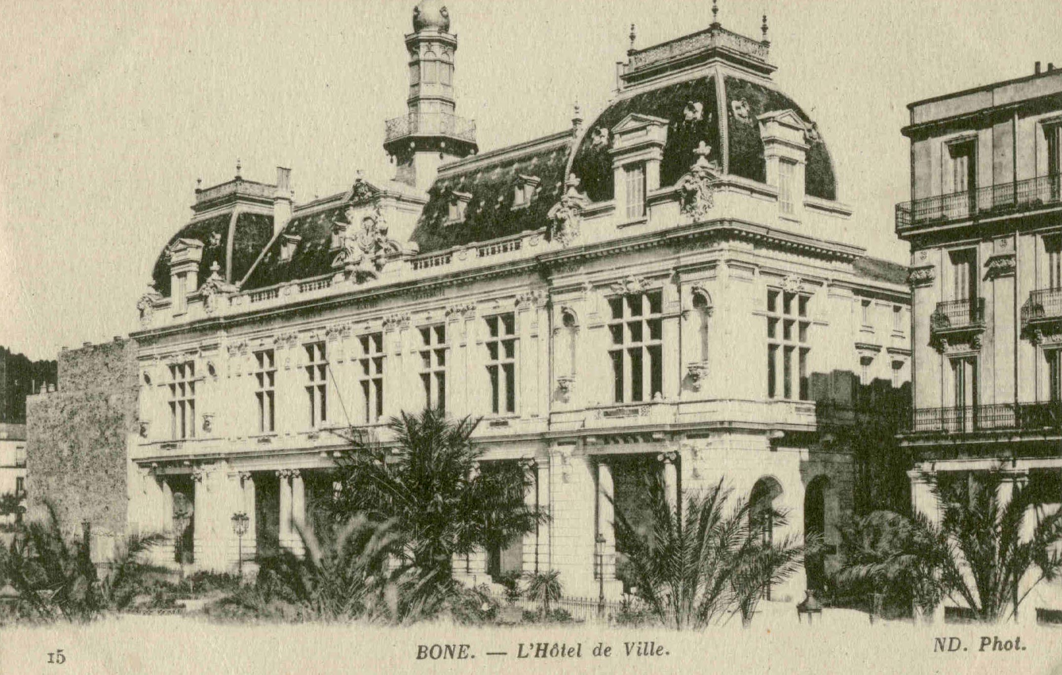 Algerie - Bone - Hotel de Ville - Architecte Marius Toudoire